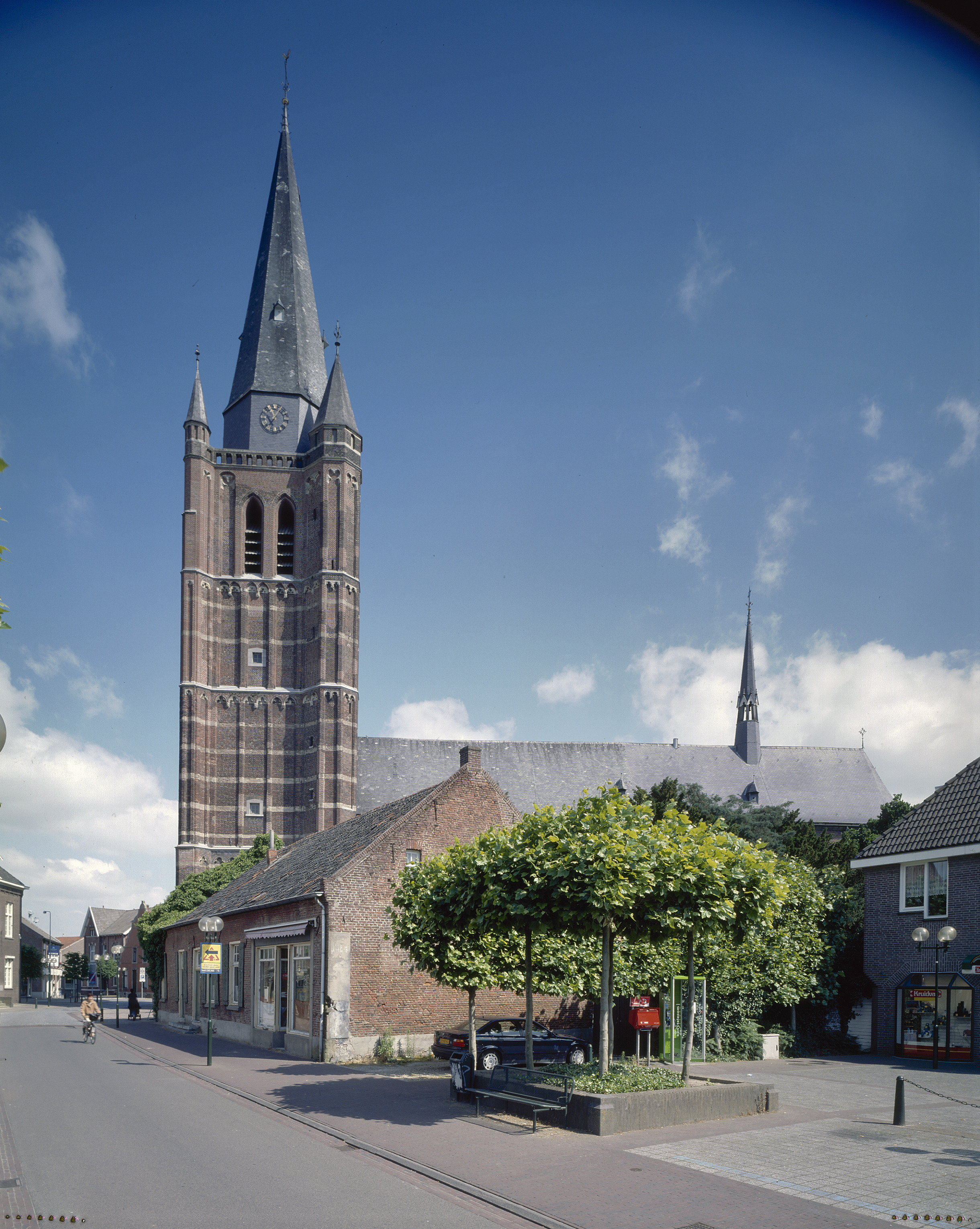 Sint Lambertuskerk: Overzicht zuidgevel met kerktoren (opmerking: Gefotografeerd voor Monumenten In Nederland Limburg)